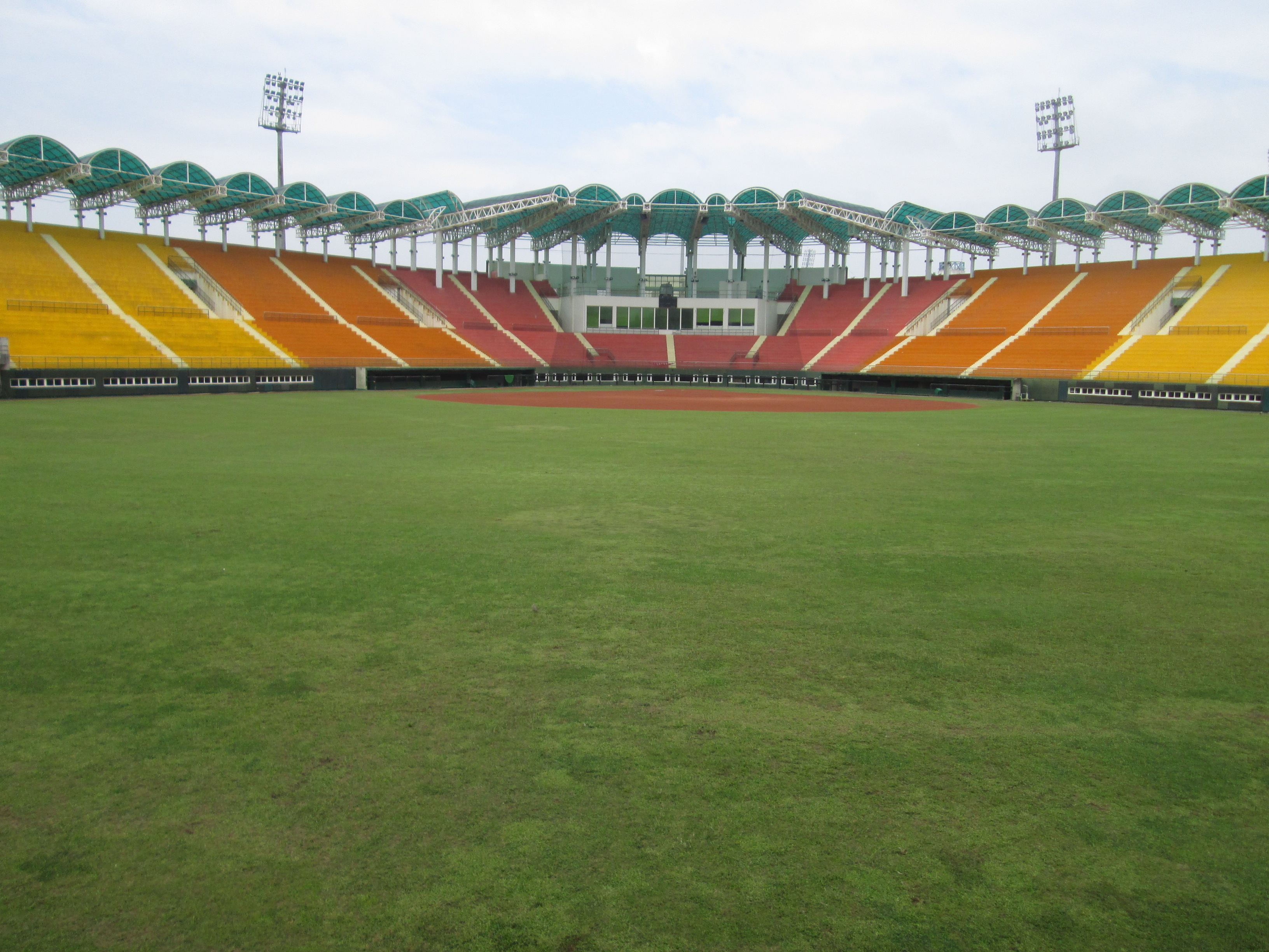 嘉義縣太保市 嘉義縣立棒球場